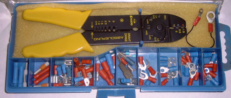 Quetschülsen & Zange